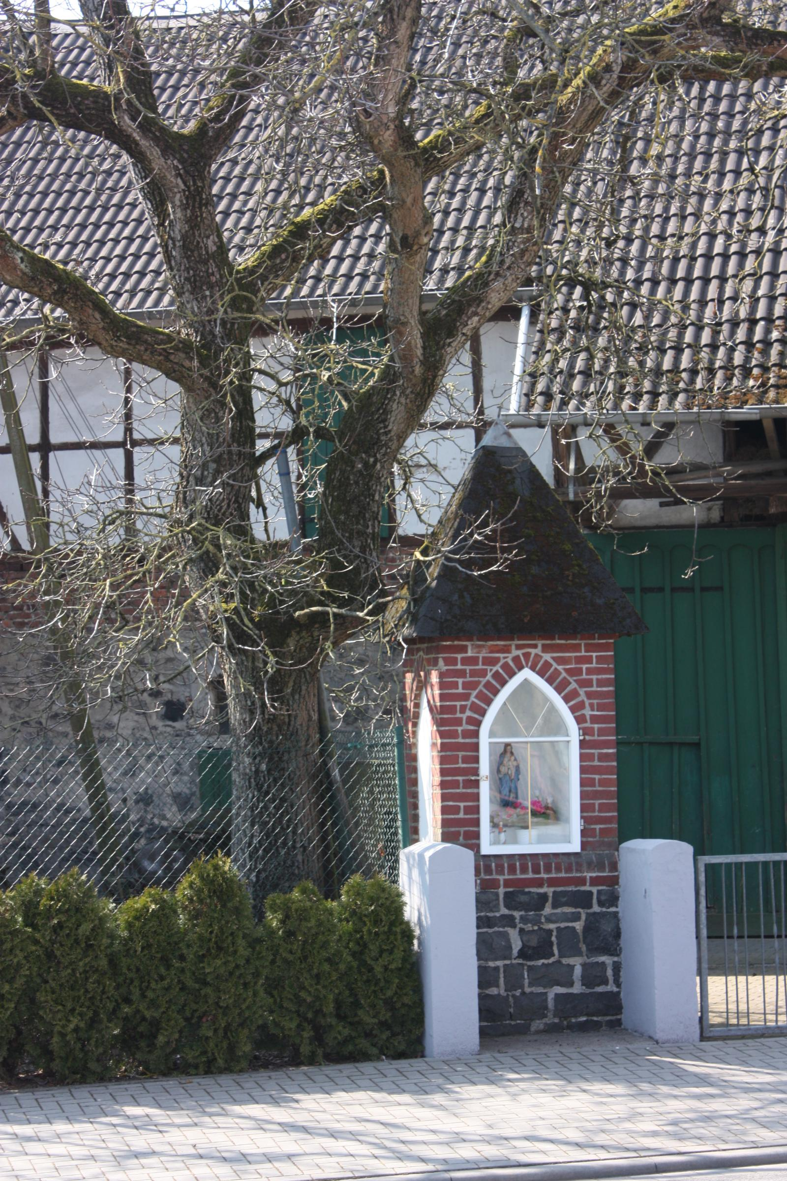 Bildstock in der Ortsmitte in Hausen, Westerwald (Waldbrunn), Hessen, Deutschland